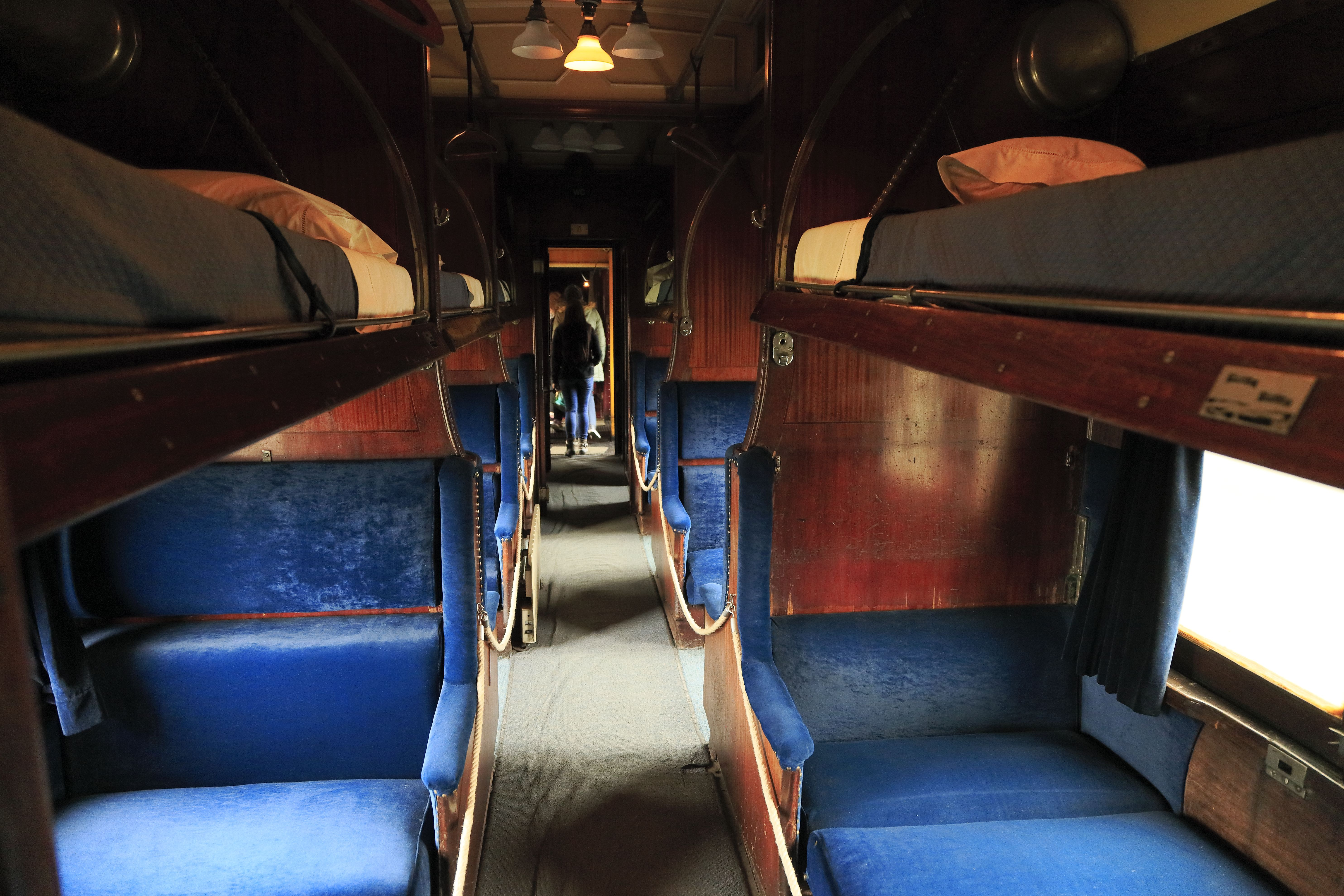 Großraum nach Pullmanart, die oberen Betten sind ausklappbar, in der unteren Ebene werden die Sitzflächen, wie rechts im Bild zu sehen, zusammengezogen. Das Fahrzeug wurde 1935 von den Linke-Hofmann-Werken für das chilenische Breitspurnetz geliefert und befindet sich seit 2003 im Museum von Temuco.